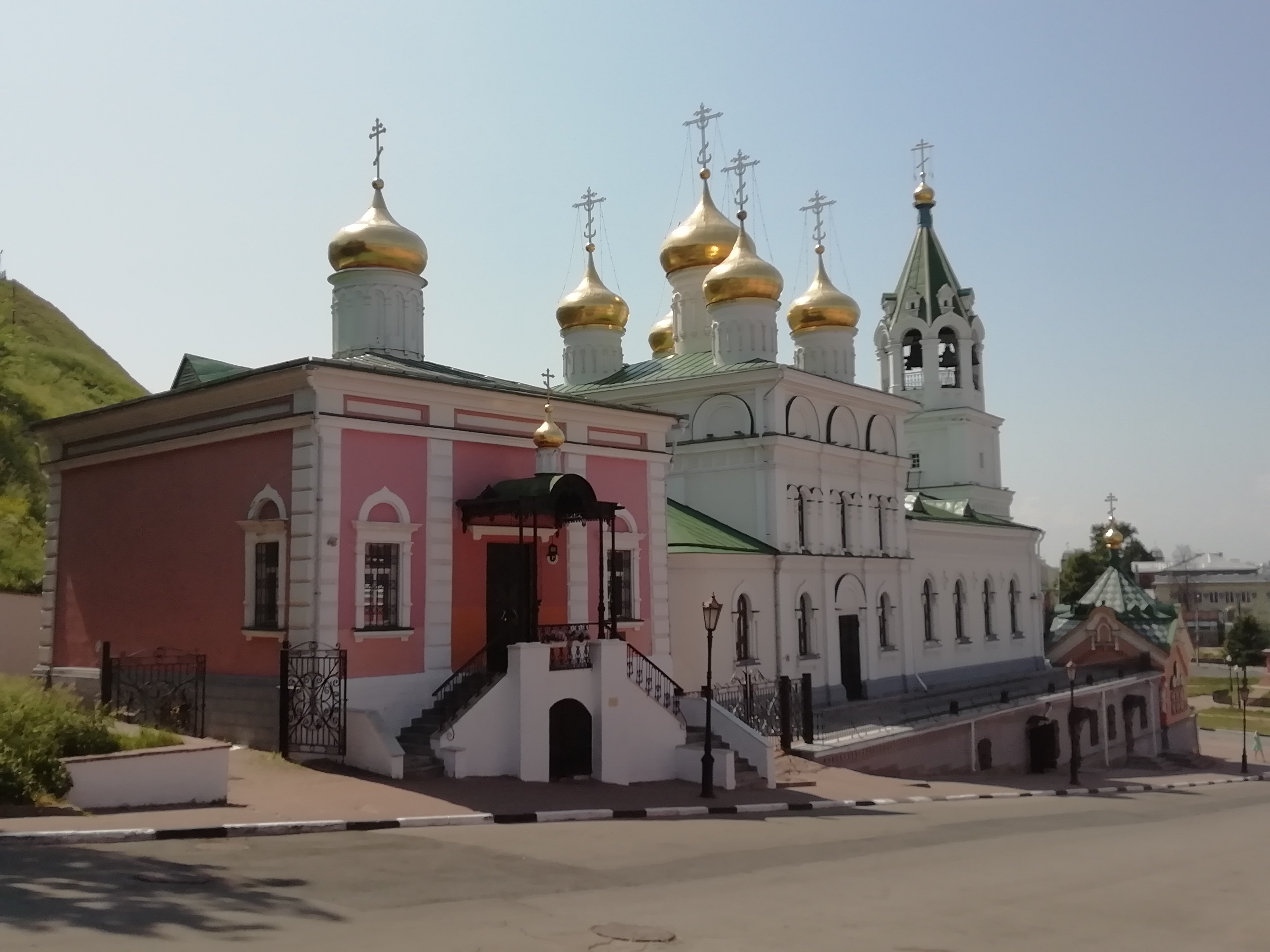 Церковь Иоанна Предтечи на Торгу, Нижний Новгород